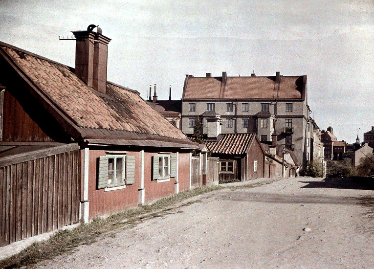 Borgmästargatan norrut från Vita Berget.